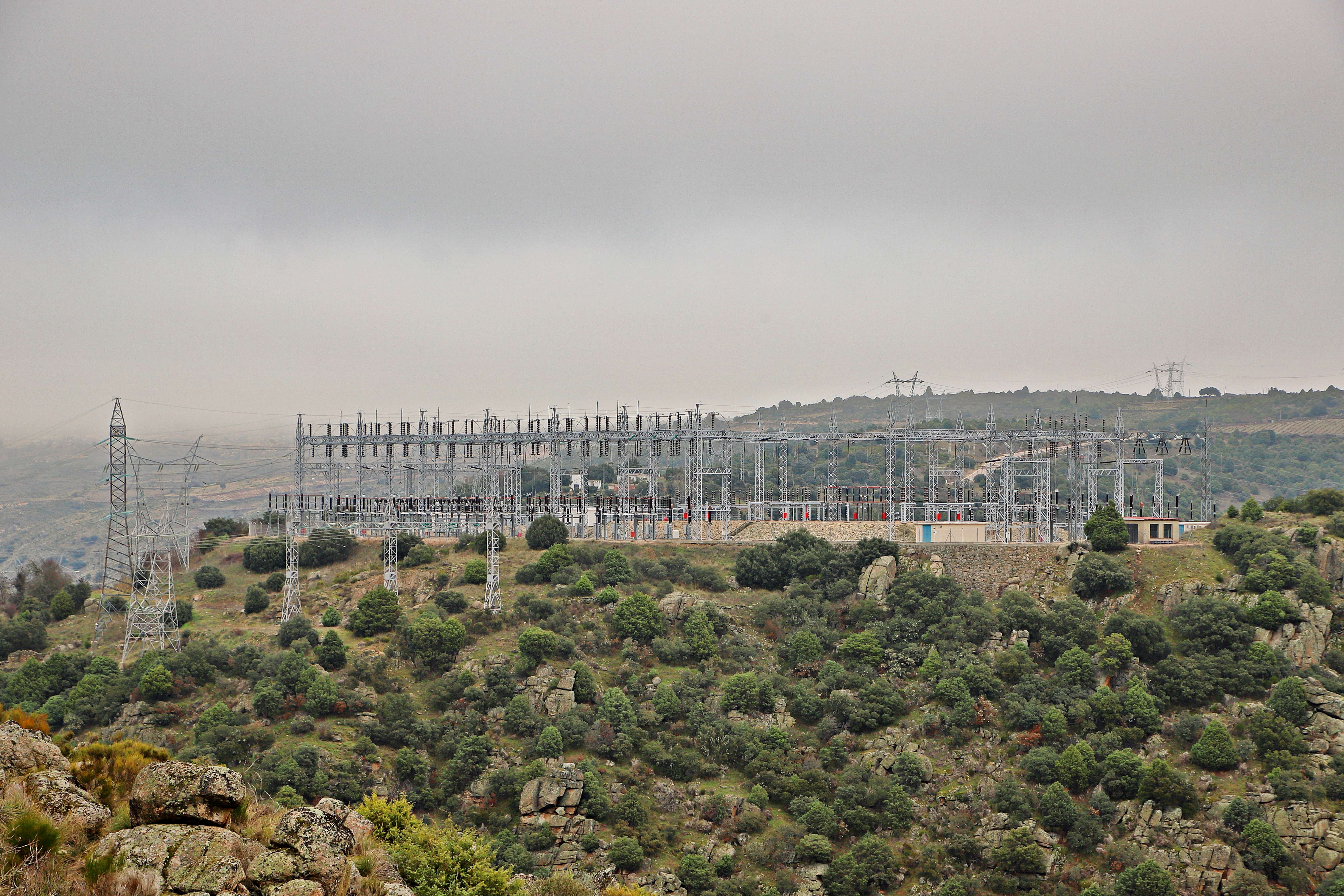 Salto de Villalcampo pertenece a la Cuenca Hidrográfica del Río Duero, en la provincia de Zamora